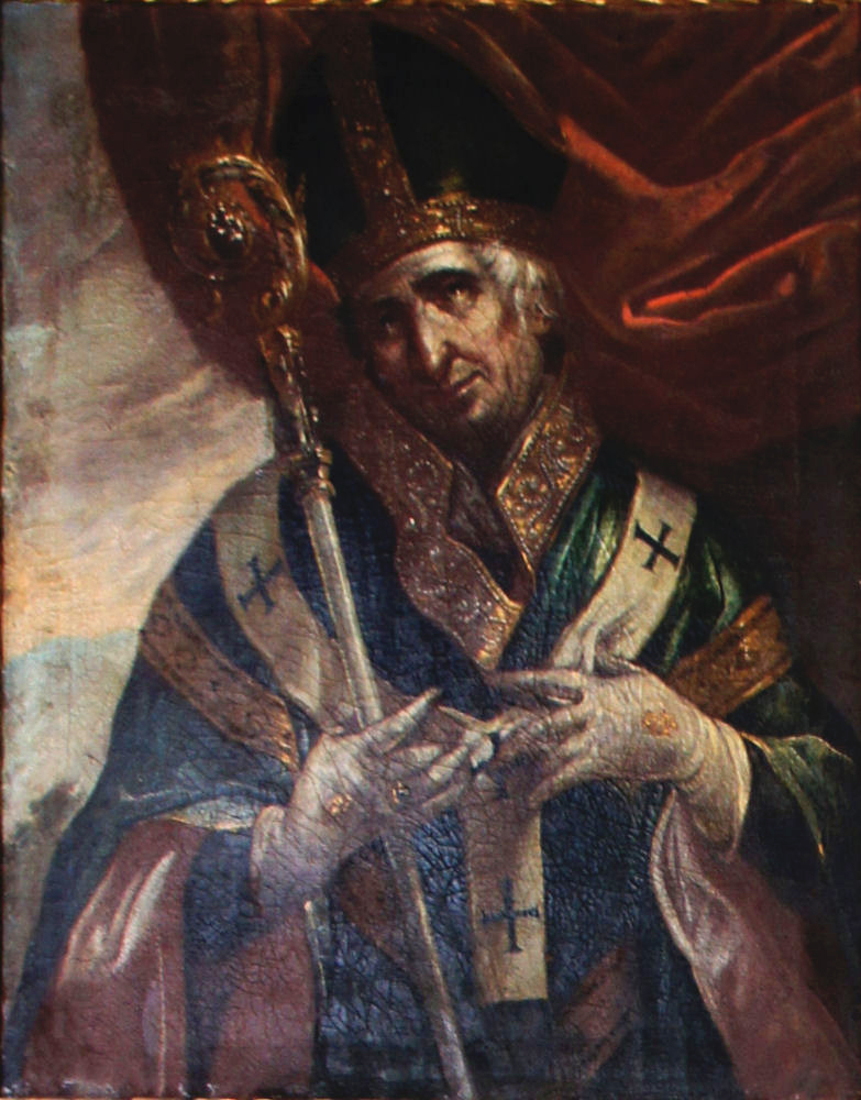 Porträtgemälde von Konrad I. von Tölz und Hohenburg, Bischof von Freising, im Fürstengang zwischen Fürstbischöflicher Residenz und Freisinger Dom.